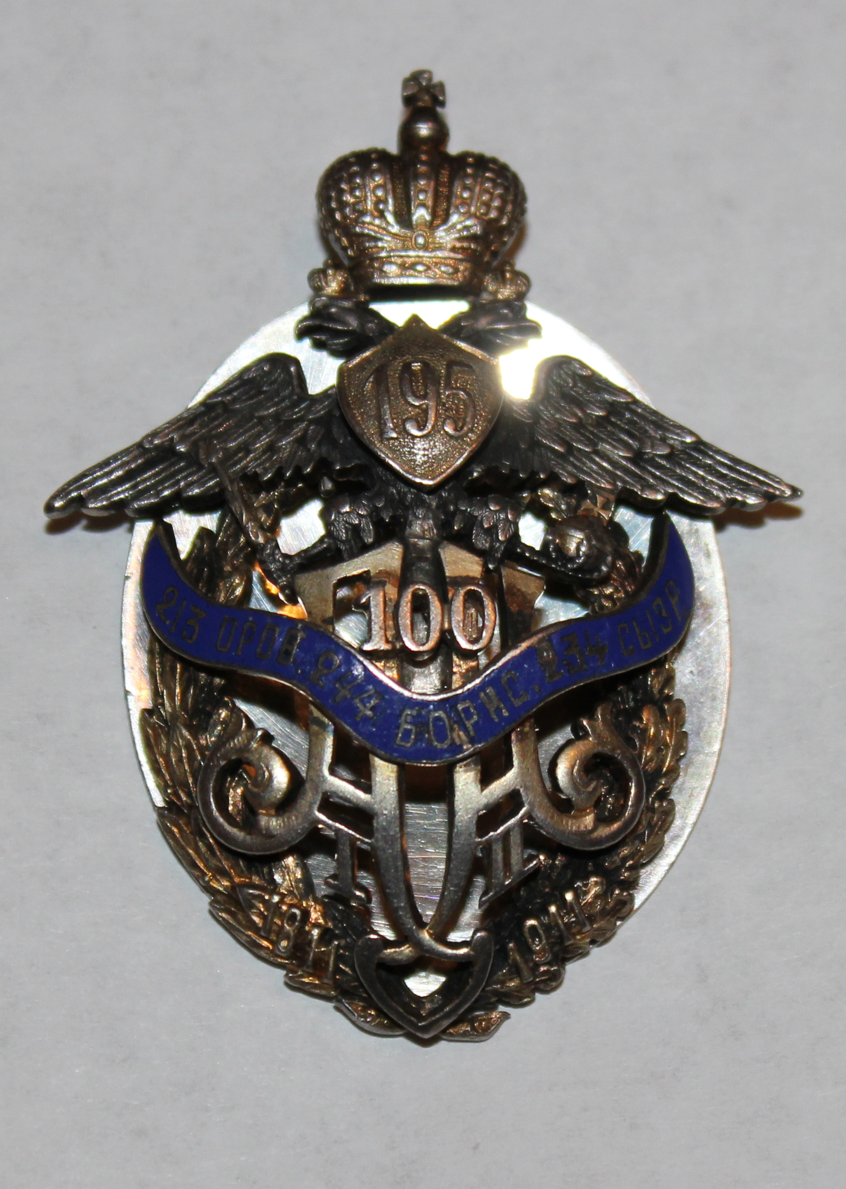 Знак в память столетия 195 пехотного Оровайского полка. 1911 год. Частное собрание.